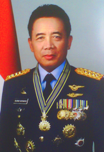 Foto Marsekal TNI Djoko Suyanto sebagai Panglima TNI Kategori:Panglima TNI